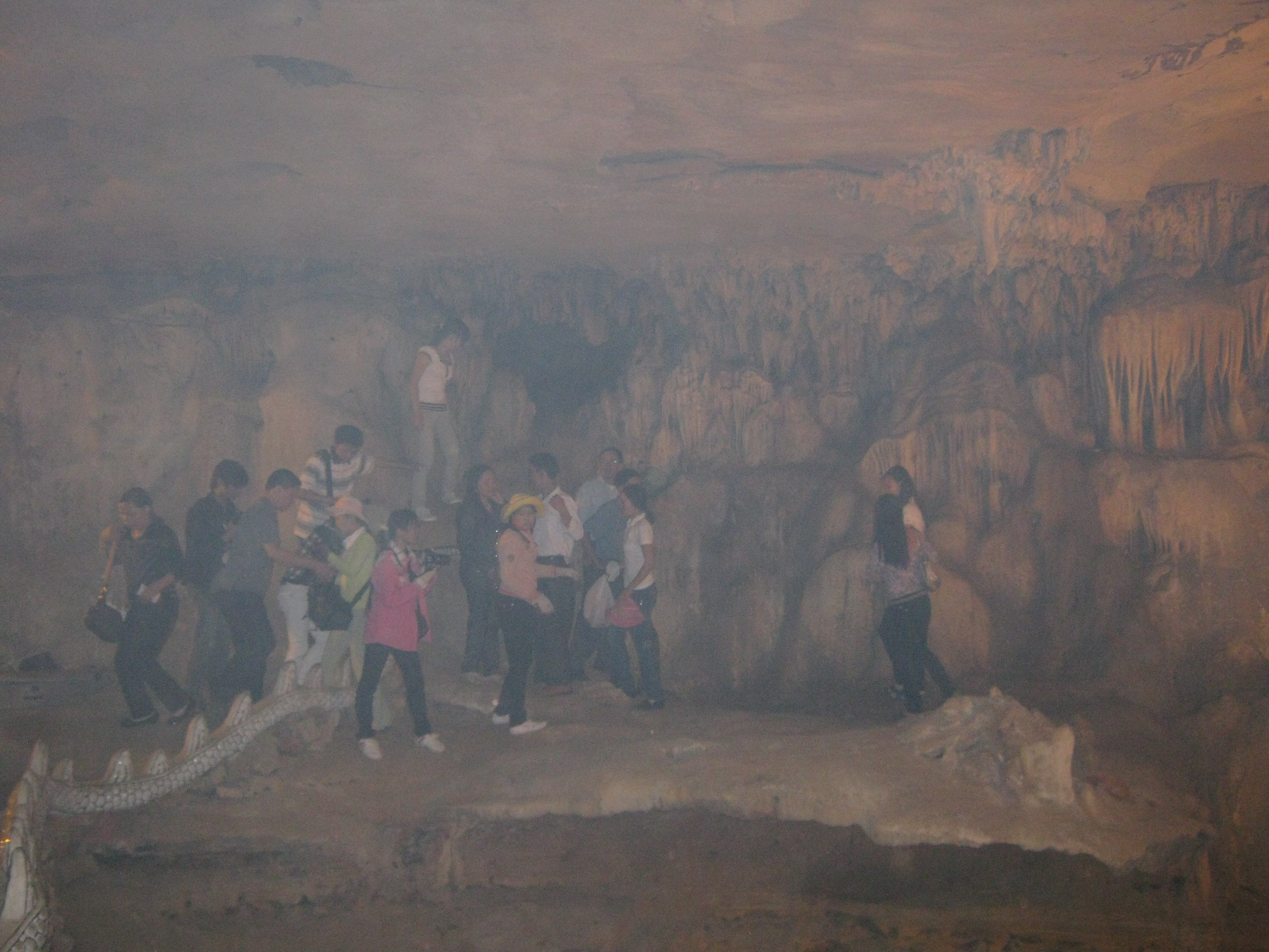 Ảnh chụp tại khu chùa Bái Đính tỉnh Ninh Bình